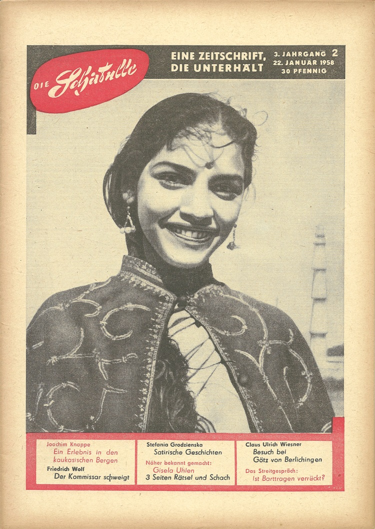 Das Titelfoto stammt von Erwin Schmidt (22. 1. 1922 bis 26. 9. 1986). Er hat es mit mündlicher Einwilligung der Abgebildeten im Januar 1956 in Indien aufgenommen.